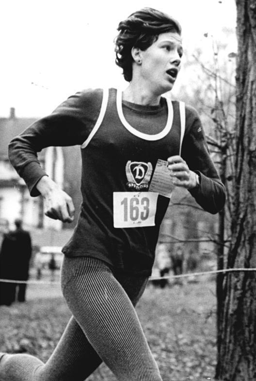 Kathrin Ullrich ADN-ZB Kluge 2.11.86 Halle: Fritz-Weineck-Gedenklauf- Die 19jährige Lehrerstudentin Kathrin Ullrich vom SC Dynamo Berlin gewann zum Auftakt der dreigeteilten DVfL-Cross-Serie im 3,8-km-Lauf der Frauen. Insgesamt umfaßte der Fritz-Weineck-Gedenklauf 22 Wettbewerbe, an denen sich insgesamt 1 500 Aktive aus 142 Sportgemeinschaften und Klubs beteiligten.